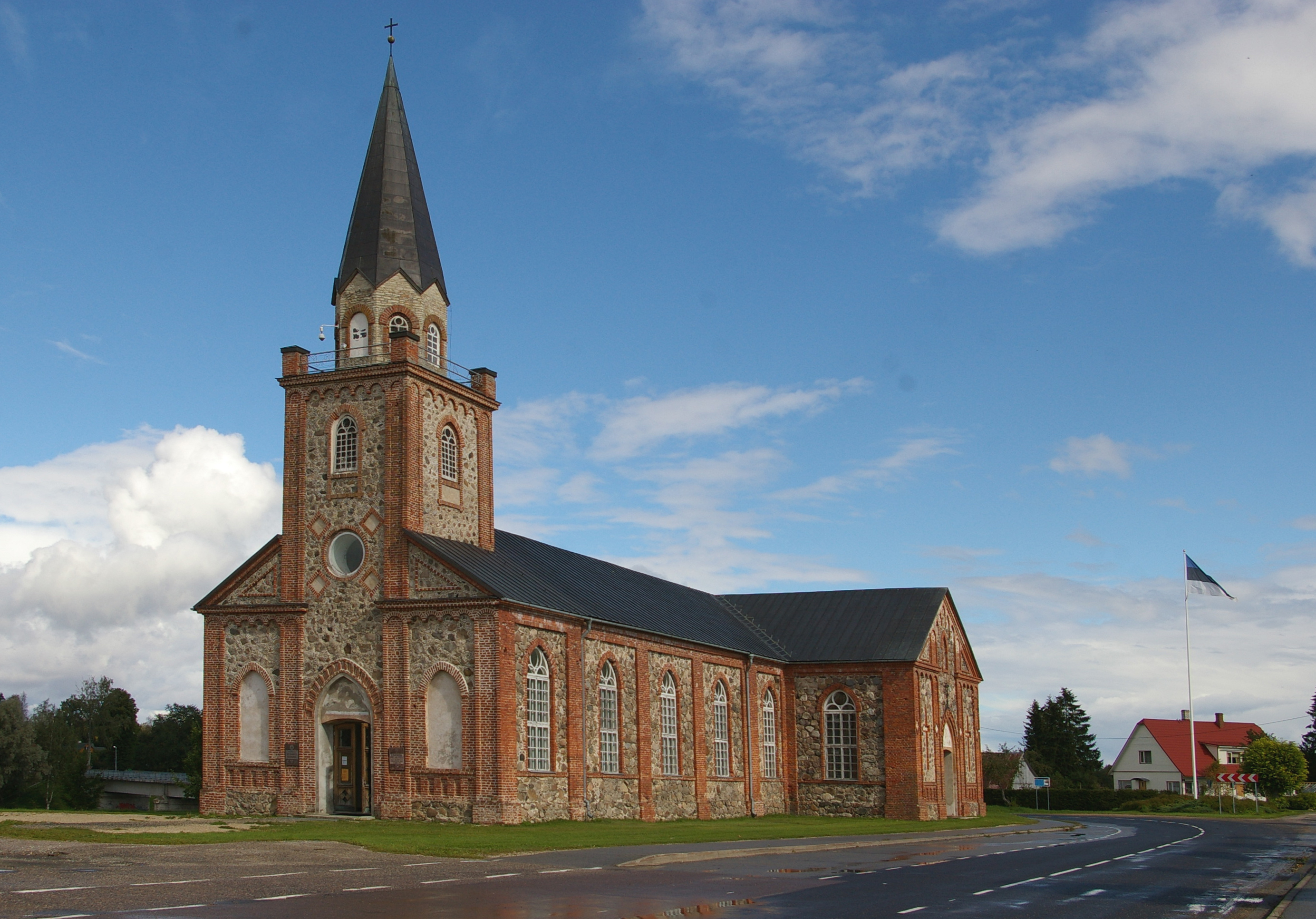 Tori kirik